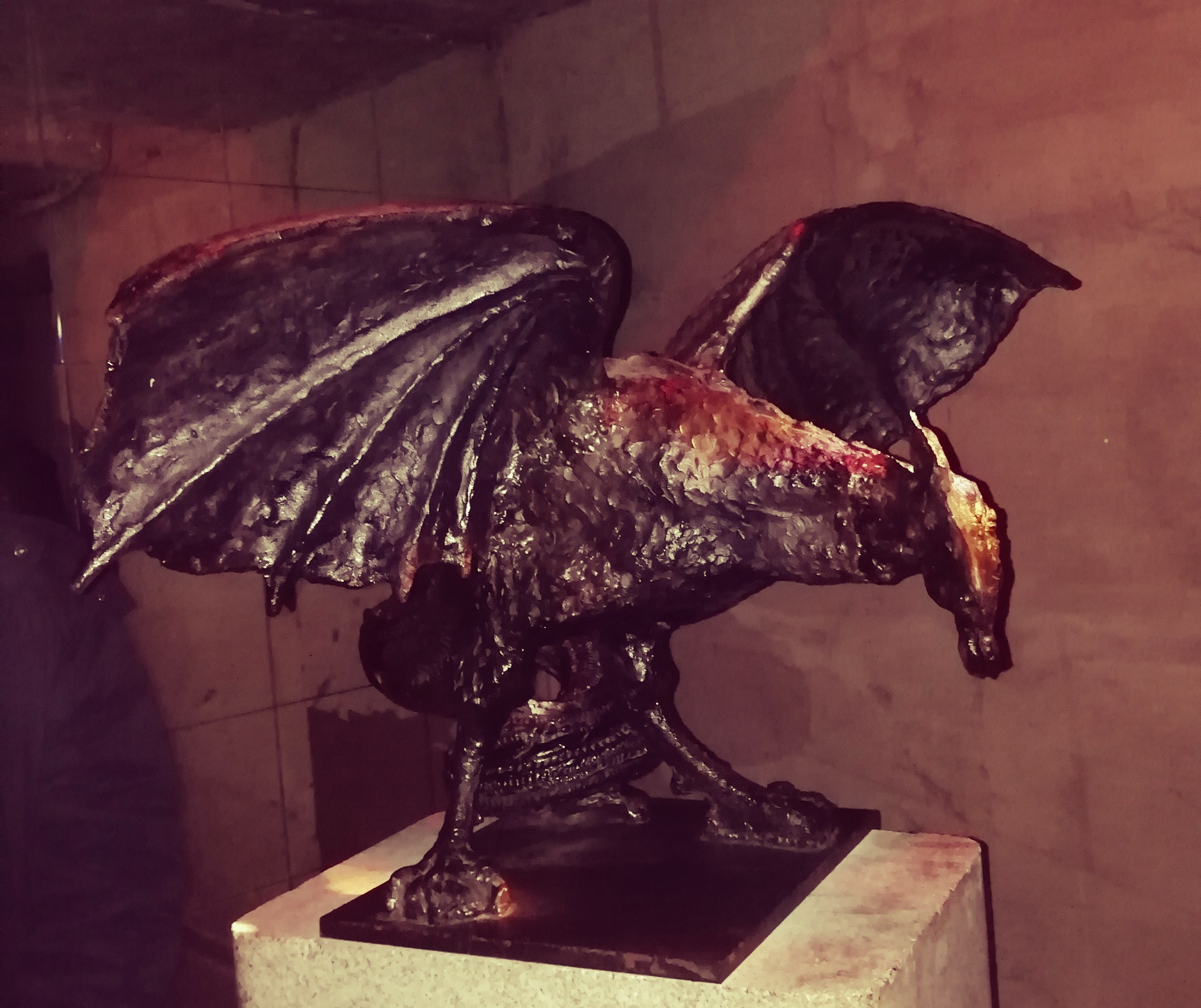 Vilniaus Bazilisko skulptūra Lietuvos nacionalinio muziejaus Vilniaus gynybinės sienos bastėjos ekspozicijoje.